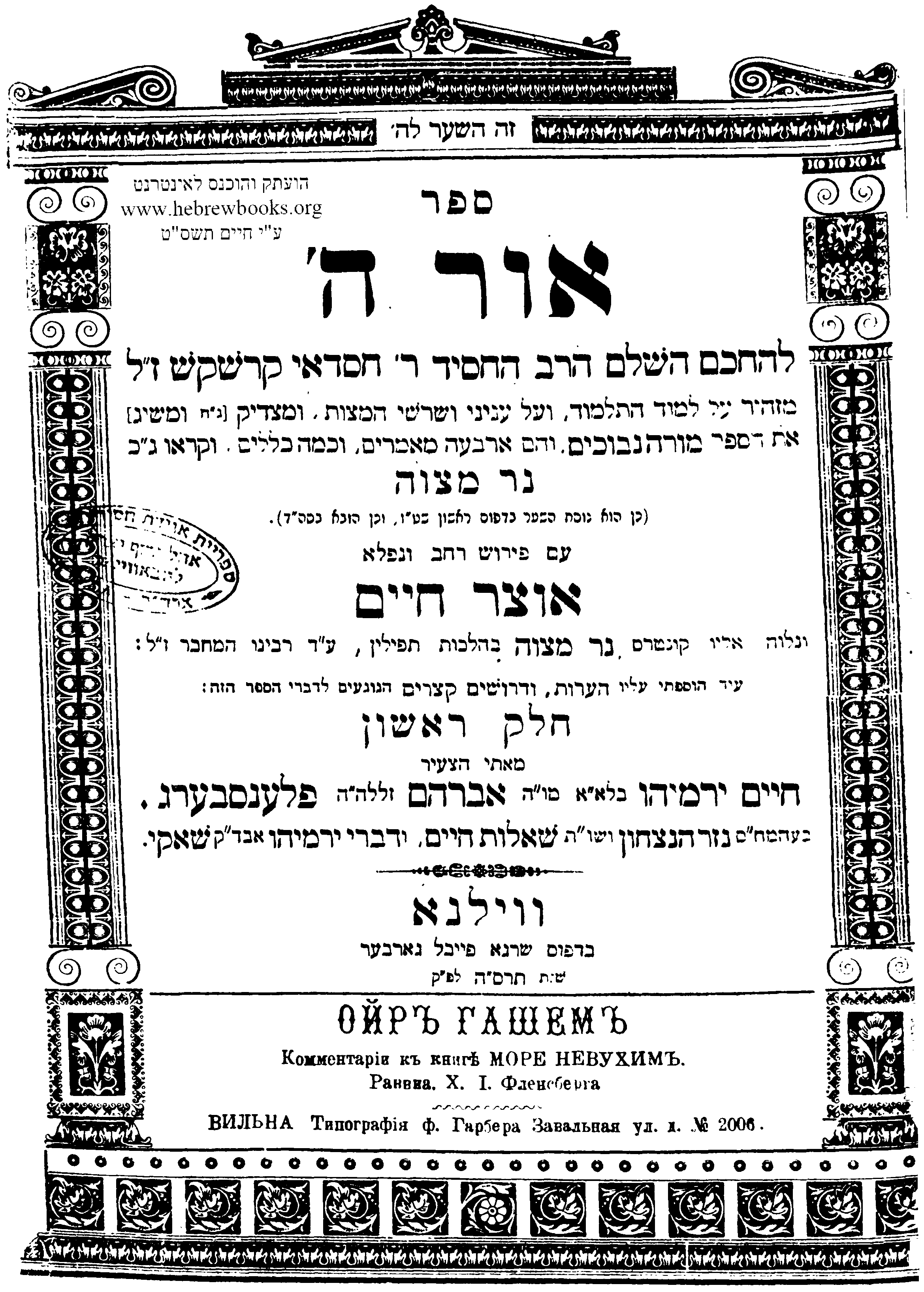 Титульный лист книги «Свет Божий»